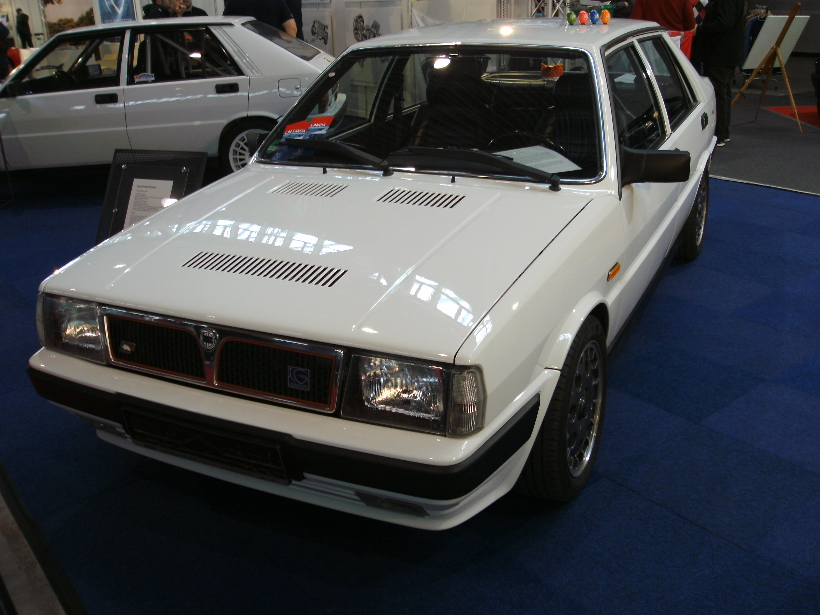 Lancia Prisma 4WD integrale, Baujahr 1987, 165 PS